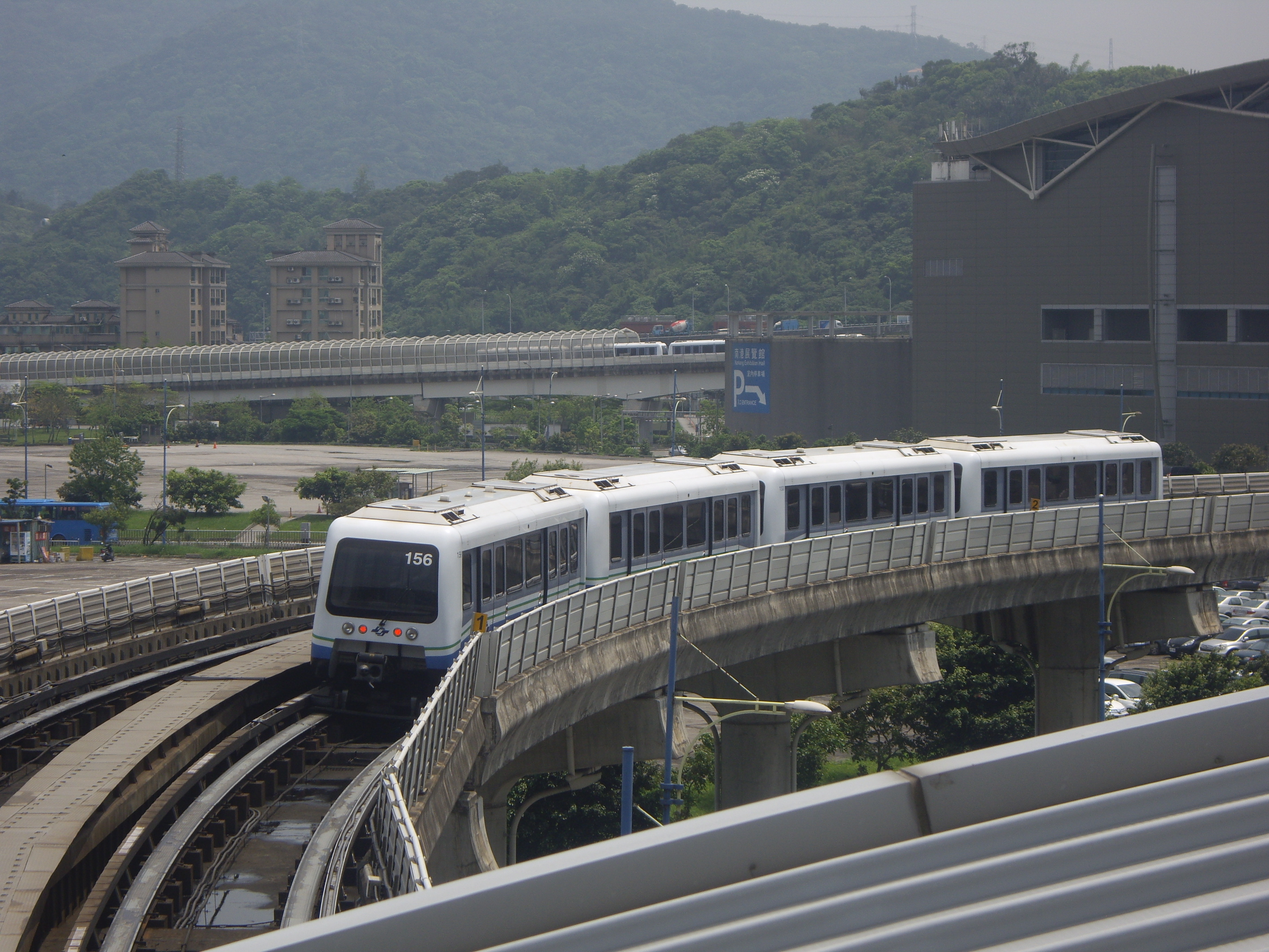 中文（台灣）: 台北捷運文湖線Bombardier INNOVIA APM 256